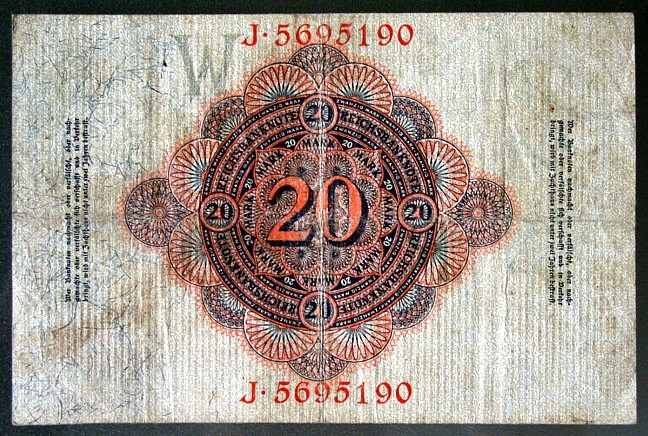 Banknote - 20 Mark - Deutsches Reich - 19.02.1914